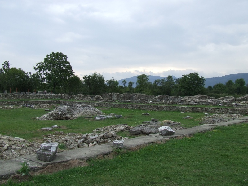 Sarmizegetuza, Hunedoara County, Romania